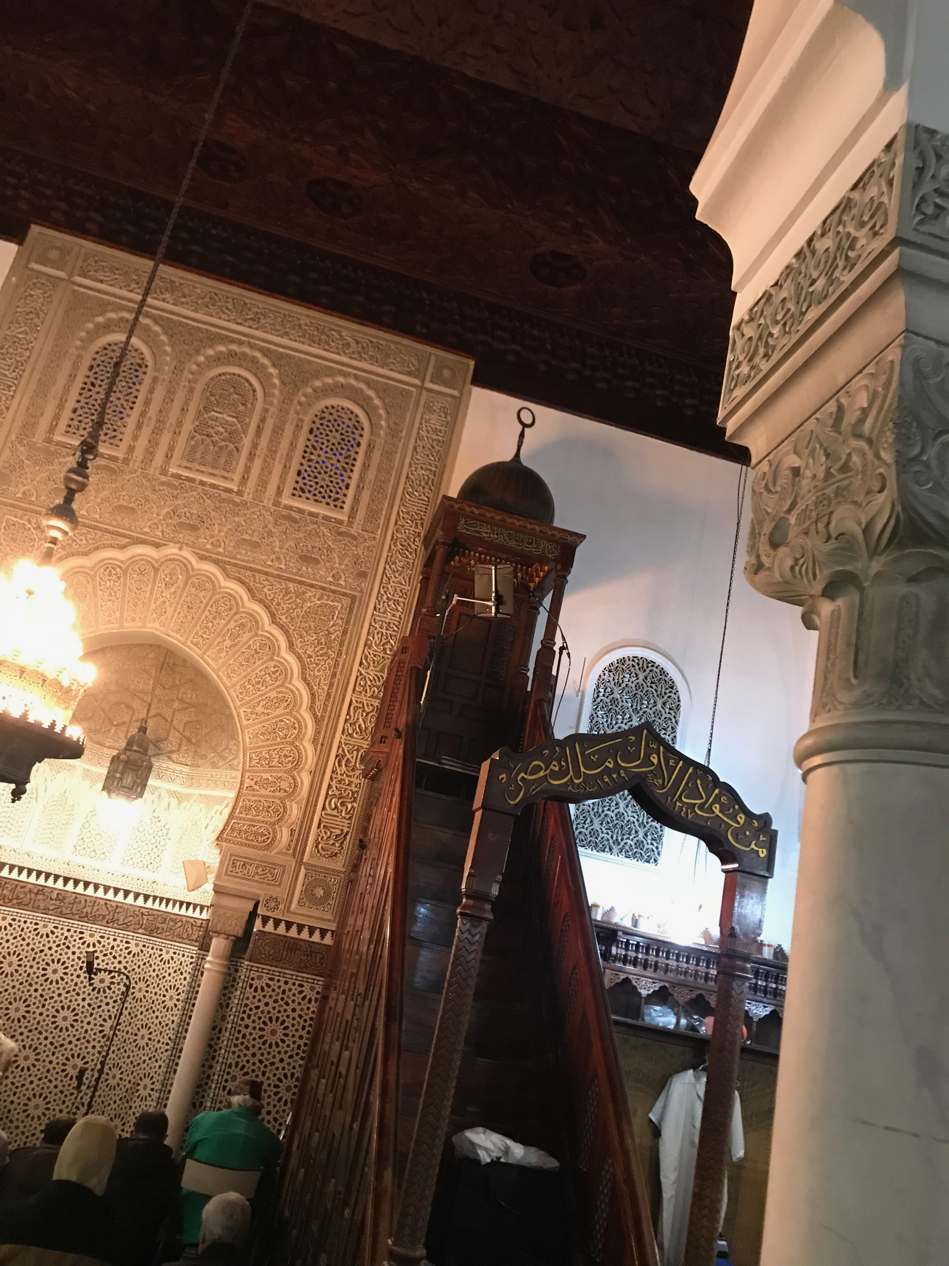 Minbar de la Grande Mosquée de Paris, 3 mai 2018.